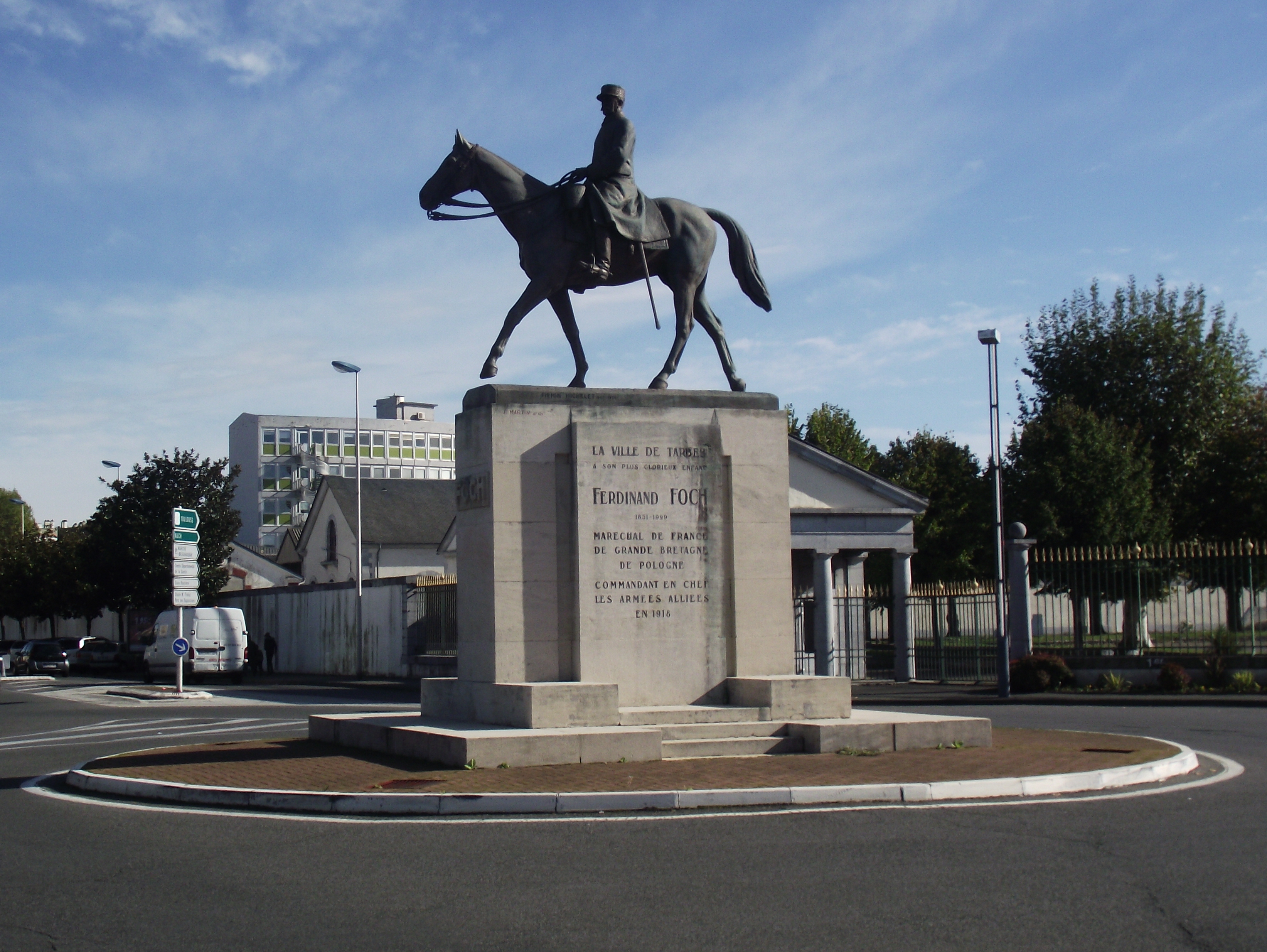 Rond-point et statue équestre de Ferdinand Foch (Tarbes, Hautes-Pyrénées, France)